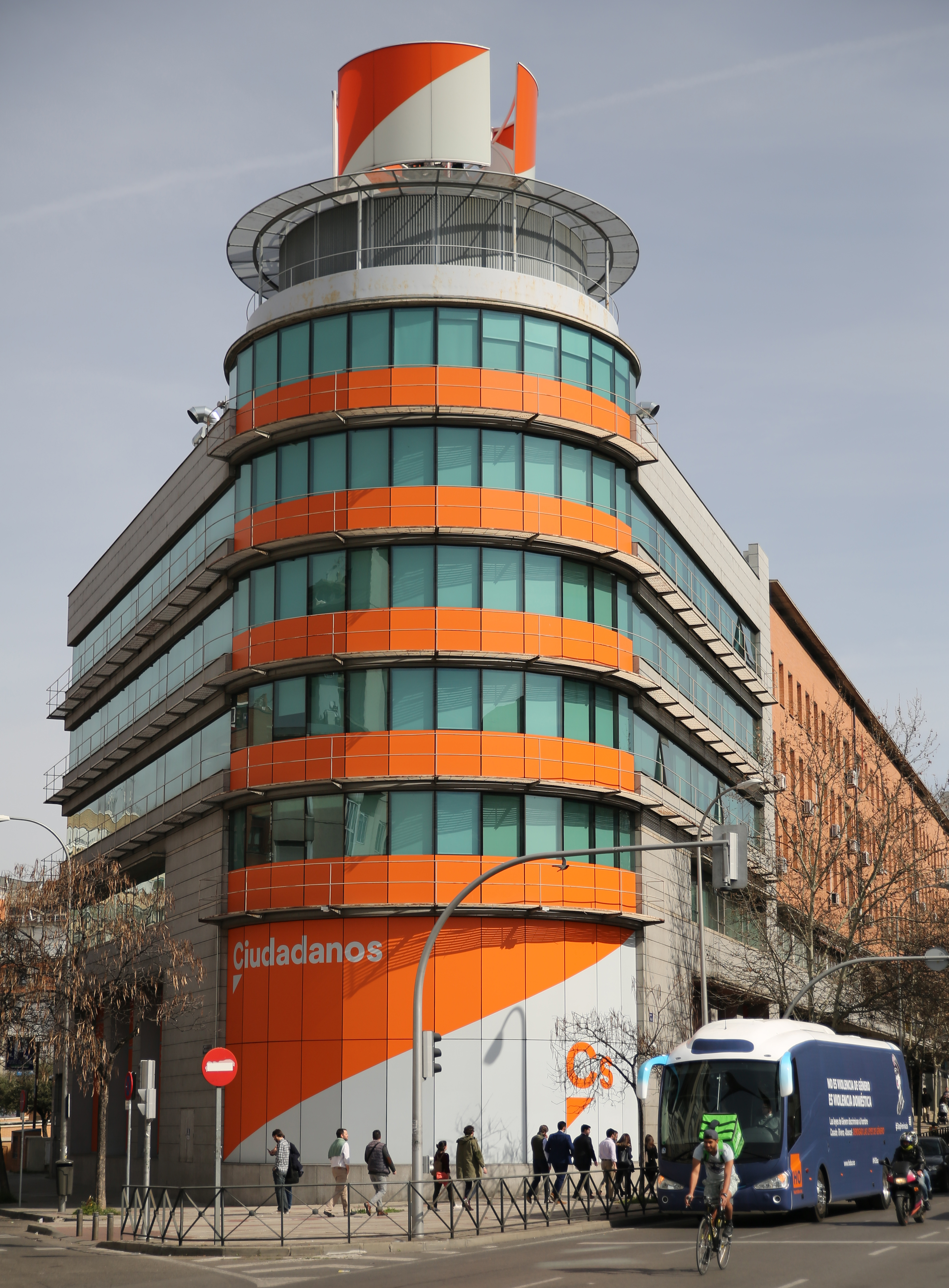 El #HOBus en Madrid con la campaña #StopFeminazis